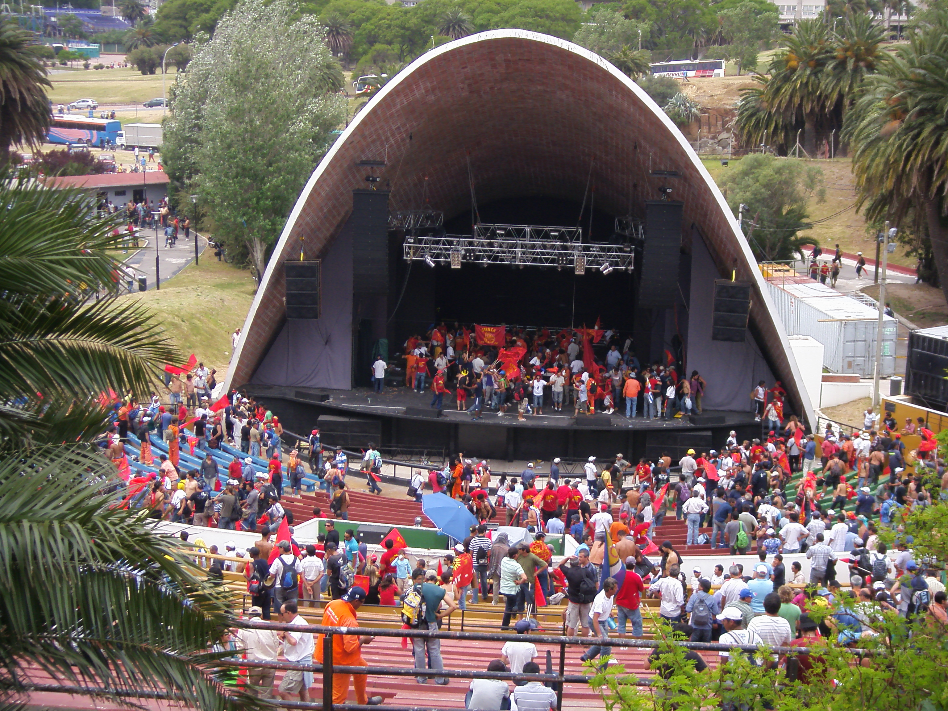 Acto organizado por el SUNCA en el Teatro de Verano Ramón Collazo.